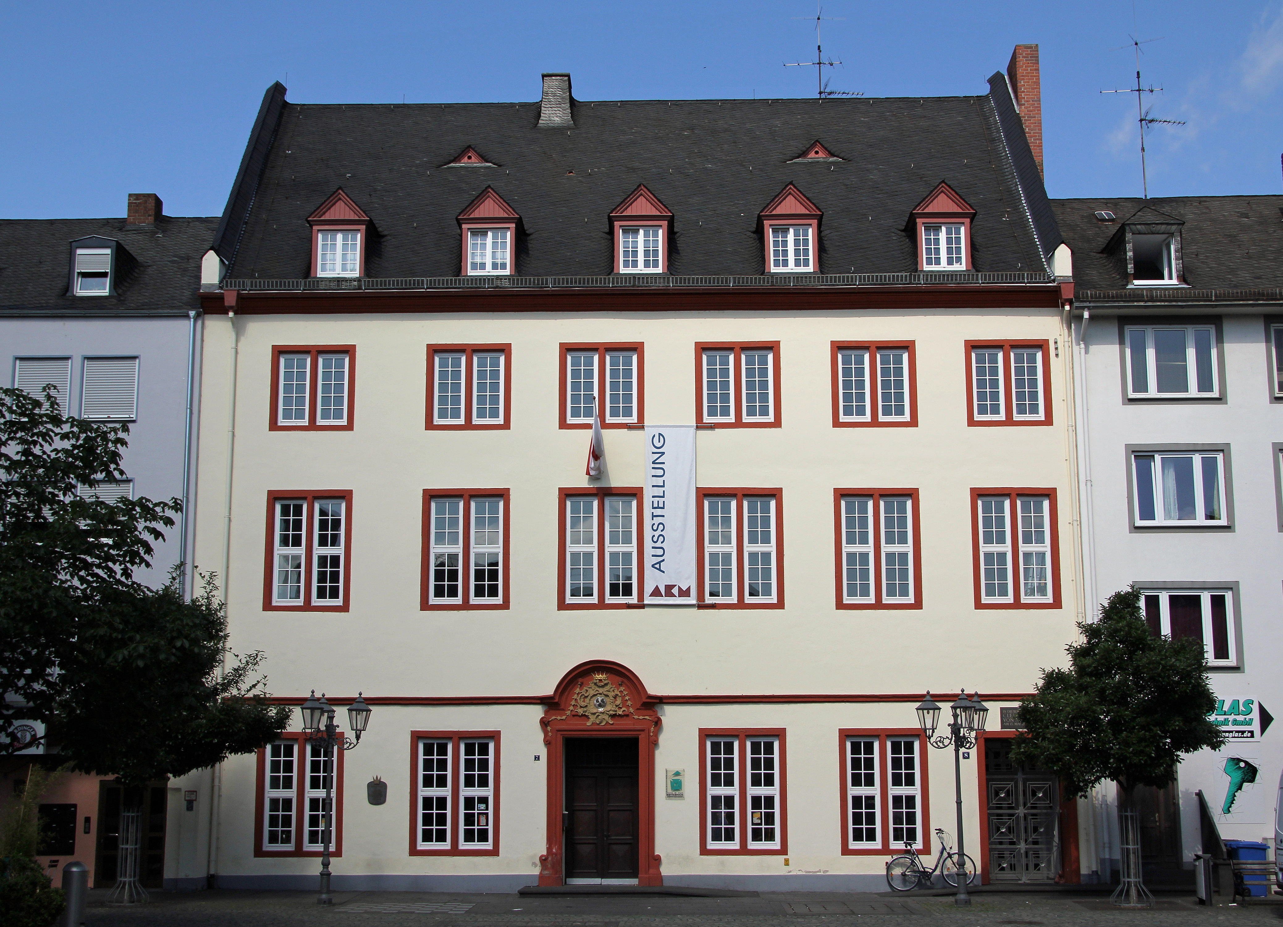 Koblenz im Buga-Jahr 2011 - Das Haus Metternich